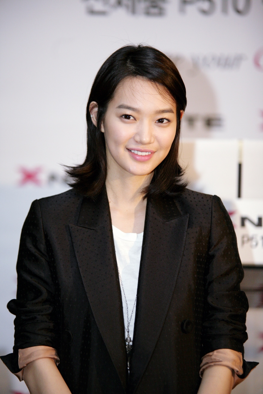 Xnote-p510 런칭 파티 2009. 2. 17(화) 논현동 학동역 로얄토토갤러리